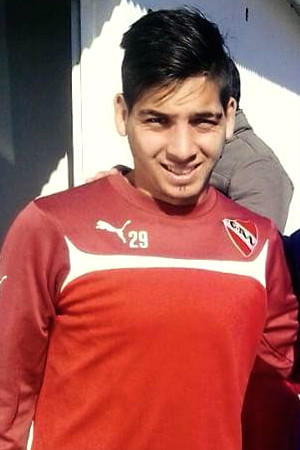 Martín Benítez, jugador de Independiente. 2015.